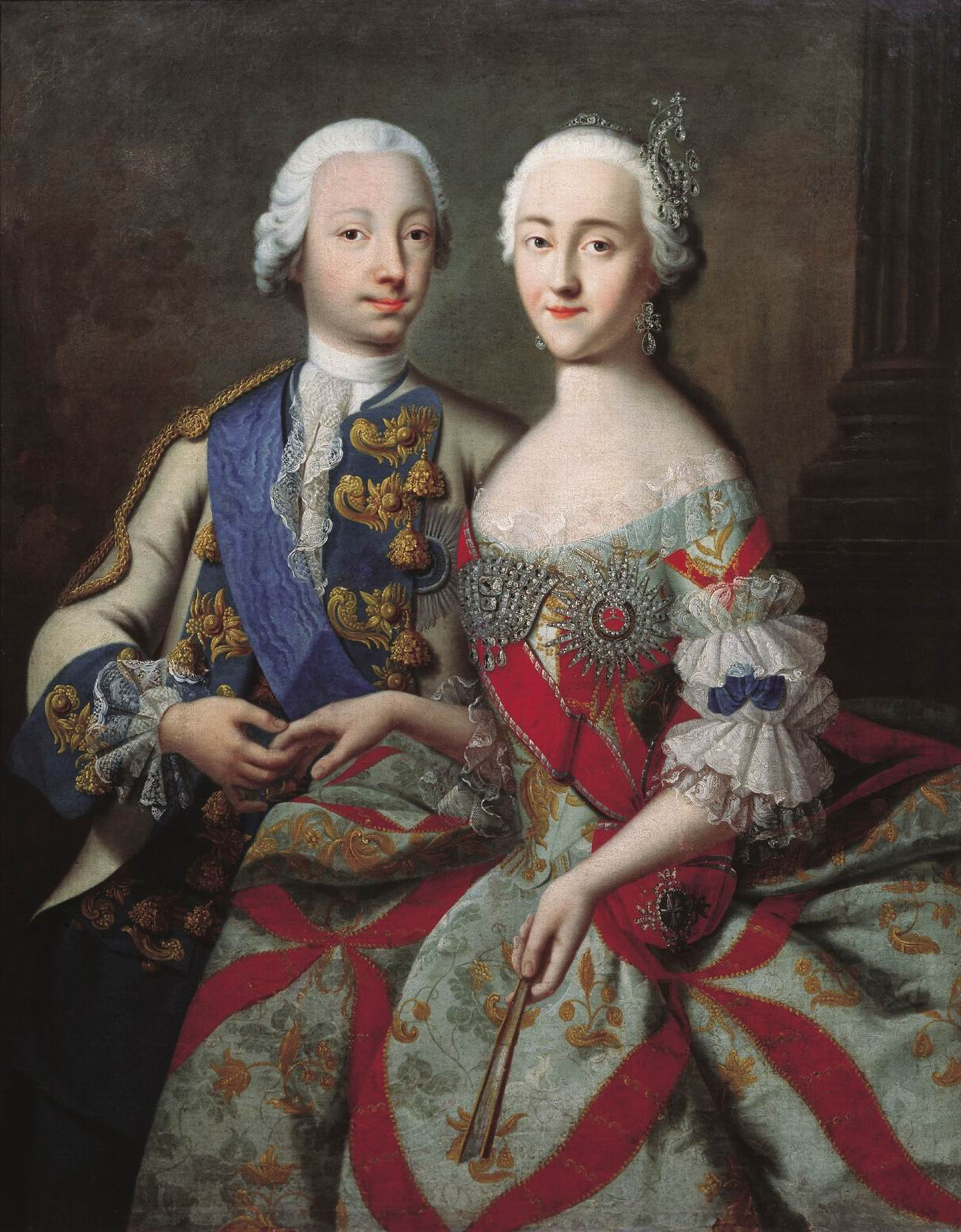 Изображение поколенное. Справа - Екатерина Алексеевна, фигура в три четверти влево, голова - чуть влево. На ней открытое светлое платье, украшенное красными лентами, золотым шитьем и кружевами. На голове белый парик с драгоценностями. Через плечо красная орденская лента, слева на груди звезда ордена Святой Екатерины. В левой опущенной руке веер, пальцы правой - в правой руке Петра Фёдоровича. Он изображён слева, голова и фигура повернуты вправо. На нём белый мундир с голубыми, расшитыми золотом отворотами, кружевные манжеты и жабо, шнуровые эполеты, на голове белый парик. Через правое плечо надета голубая орденская лента, слева на груди звезда ордена Святого Андрея Первозванного. Справа - часть колонны. Фон зеленовато-коричневый.